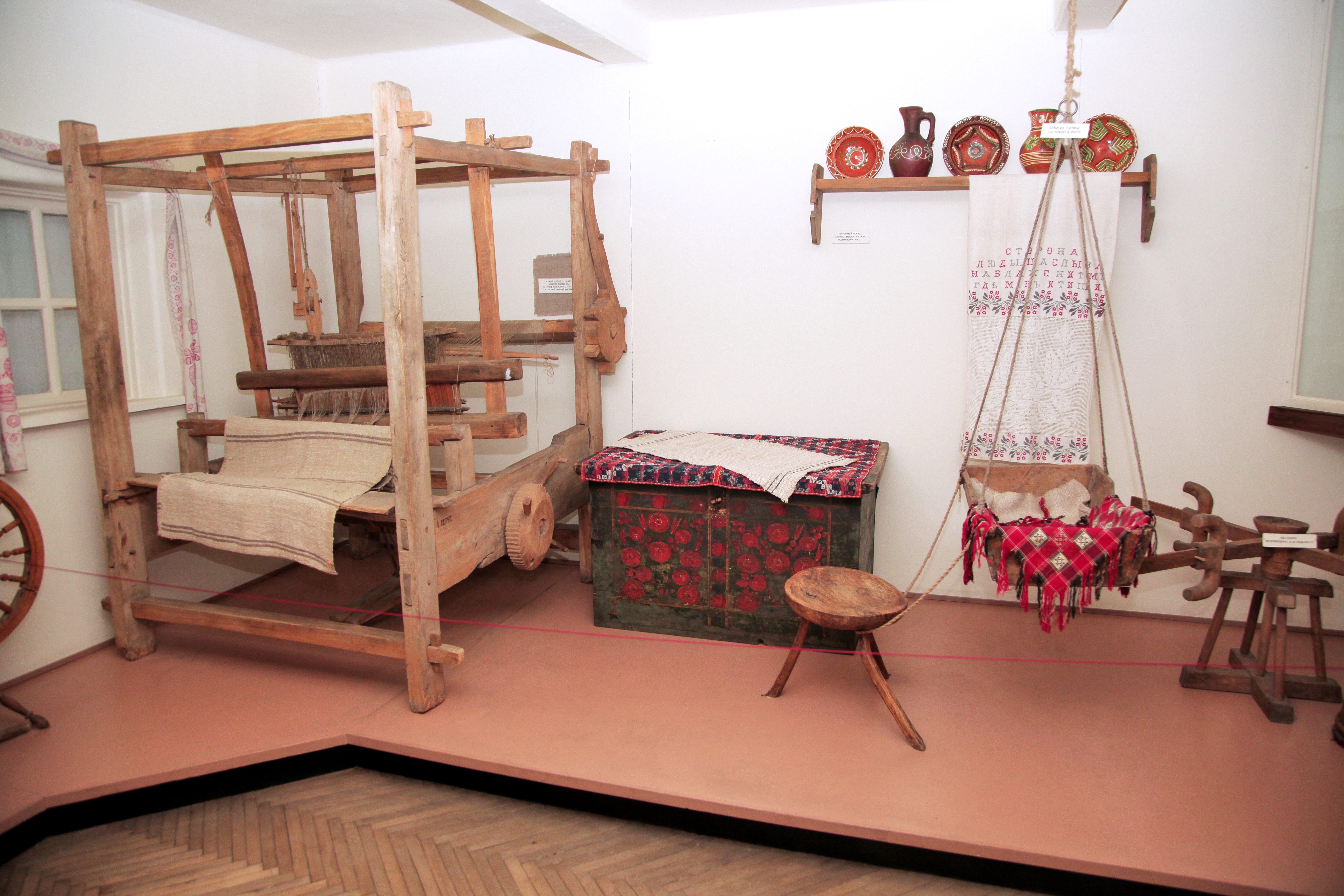 Полтавський кразнавчий музей_Зал № 13